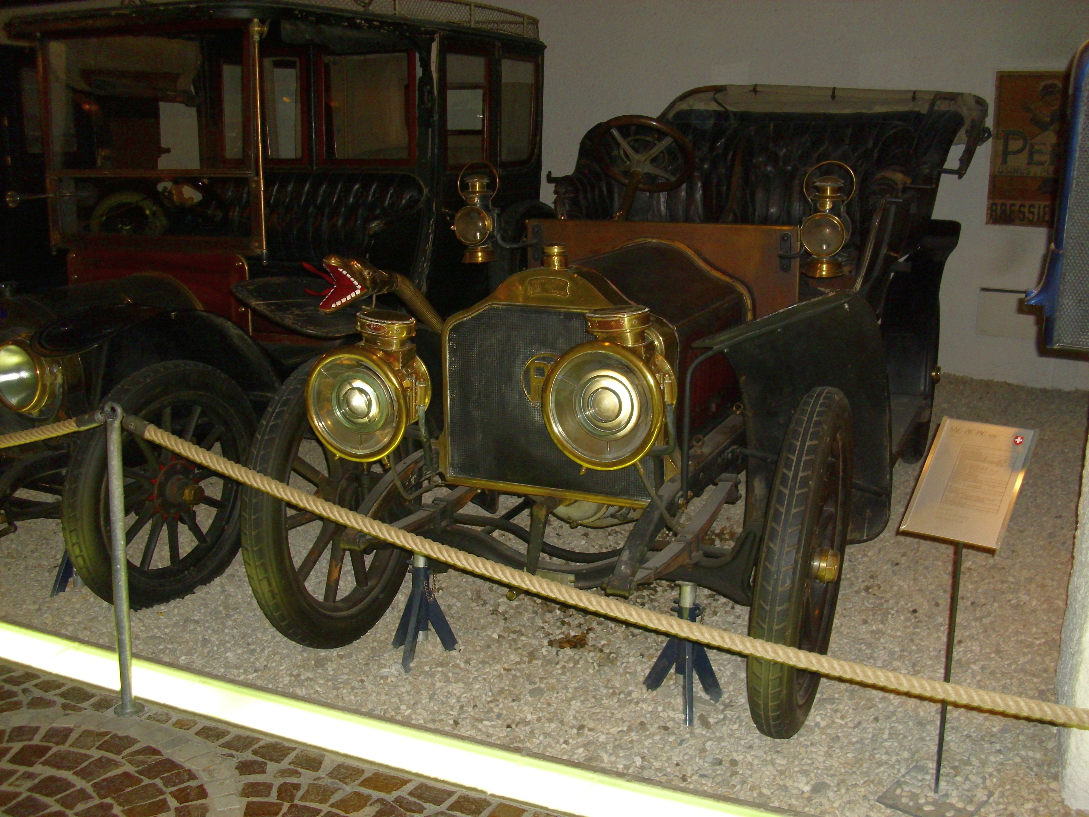 SAG 1906